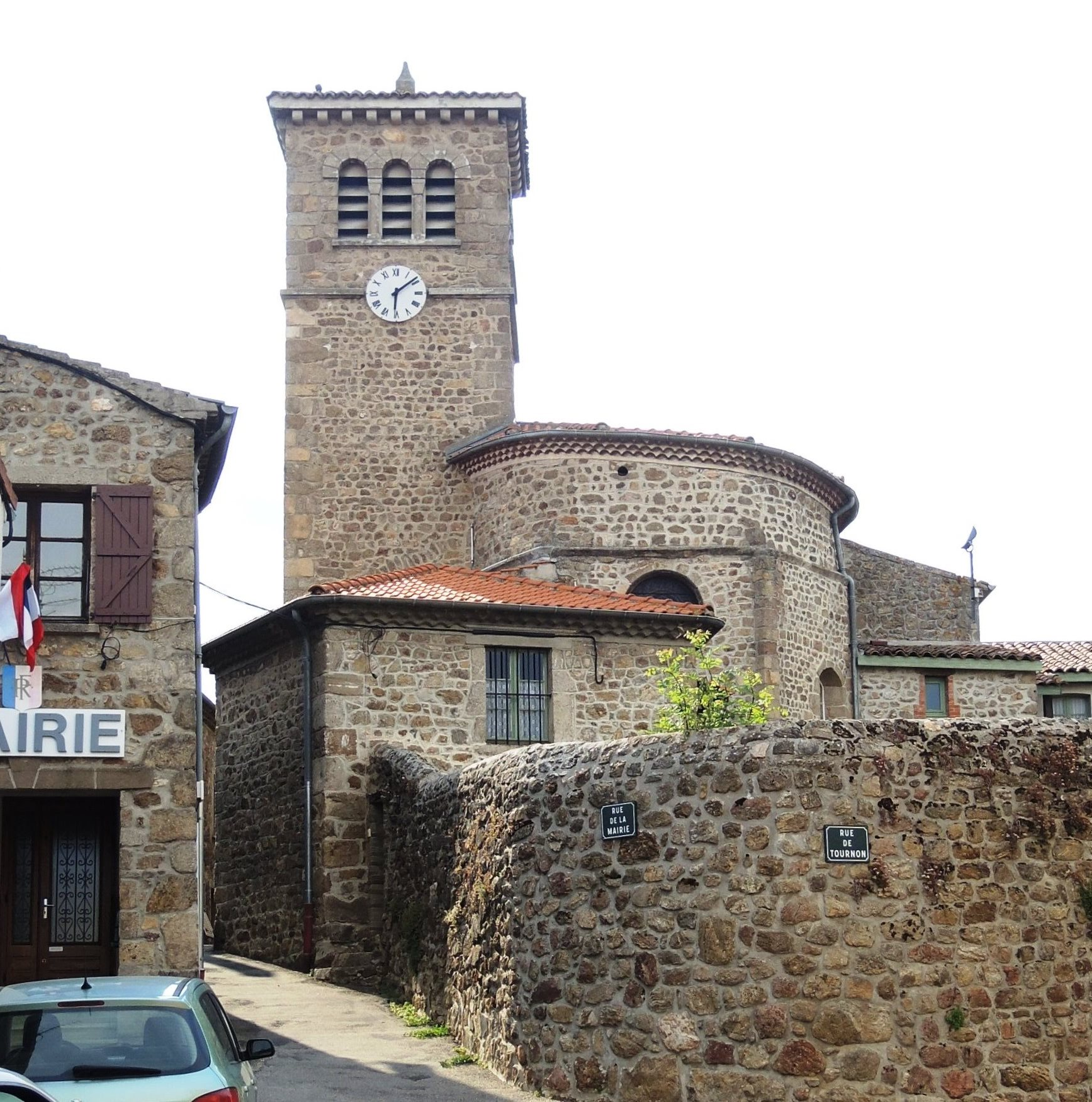 Saint-Jeure d'Ay église clocher